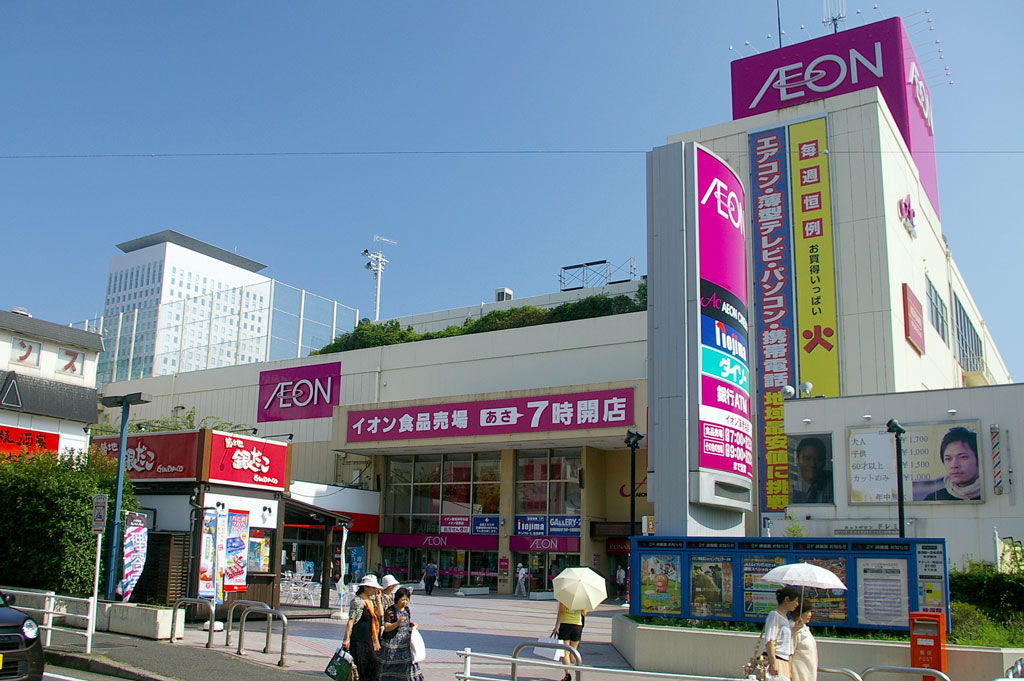 イオン海老名ショッピングセンター外観 （イオン海老名店、イオンシネマ海老名等が入居する）